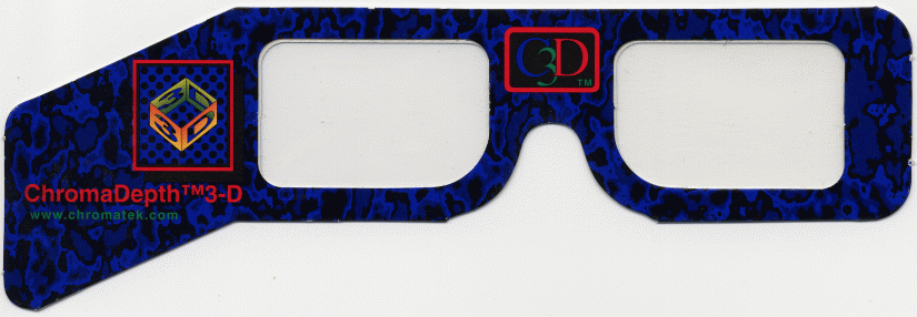 Farbfilterbrille mit Minilinsen Eingescannt am 6. November 2003